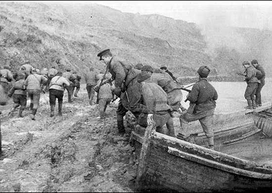 Штурмовики-десантники в бухте Керчи в ходе Керченско-Эльтигенской десантной операции. Ноябрь 1943 года.